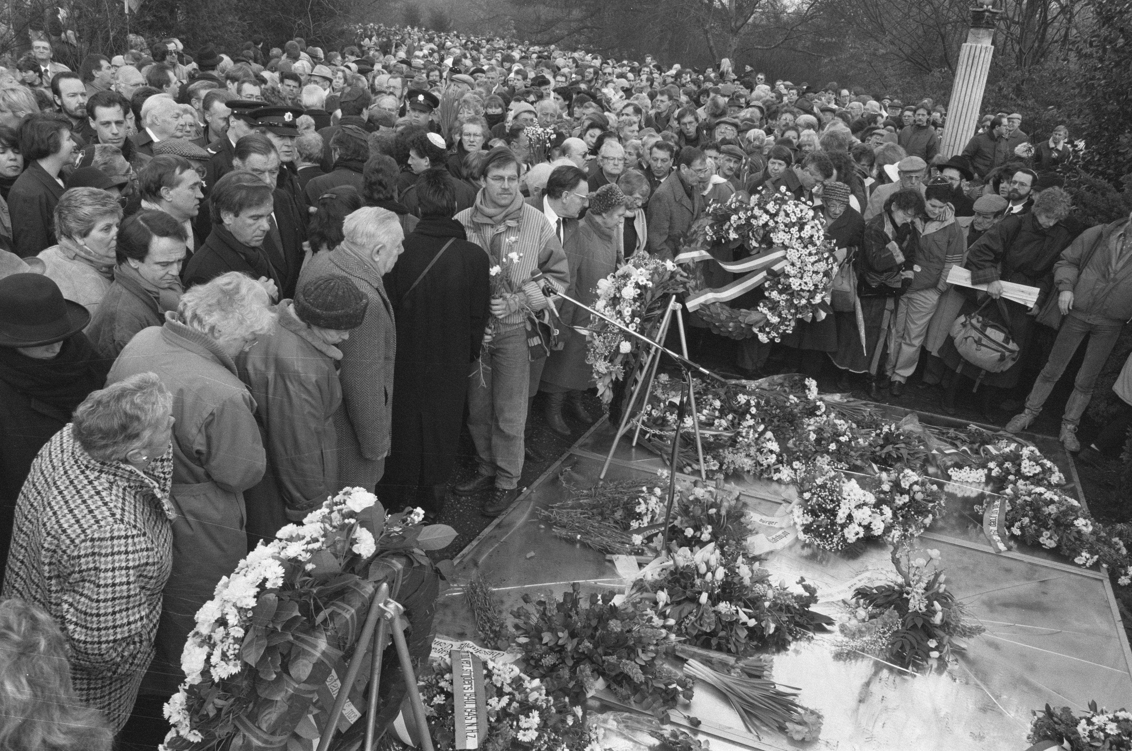 Collectie / Archief : Fotocollectie Anefo Reportage / Serie : Jaarlijkse Auschwitz-herdenking op de Nieuwe Oosterbegraafplaats te Amsterdam Beschrijving : Zeer grote drukte in verband met de vrijlating van de "Twee van Breda" Datum : 29 januari 1989 Locatie : Amsterdam, Noord-Holland Trefwoorden : begraafplaatsen, herdenkingen, oorlogsmisdadigers Fotograaf : Bogaerts, Rob / Anefo Auteursrechthebbende : Nationaal Archief Materiaalsoort : Negatief (zwart/wit) Nummer archiefinventaris : bekijk toegang 2.24.01.05 Bestanddeelnummer : 934-3959